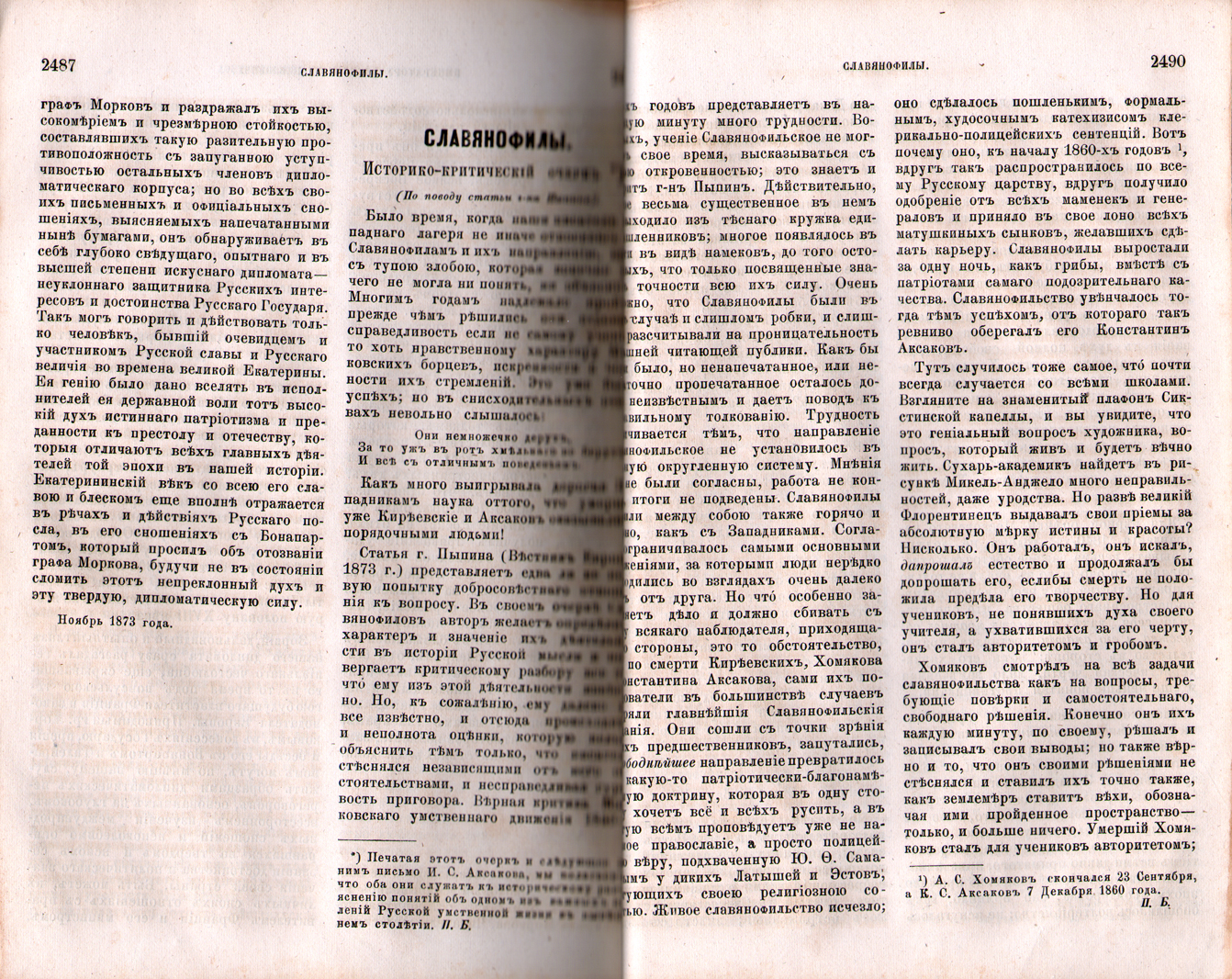 Статья Э. А. Дмитриева-Мамонова "Славянофилы" в журнале "Русский архив", 1873, № 12